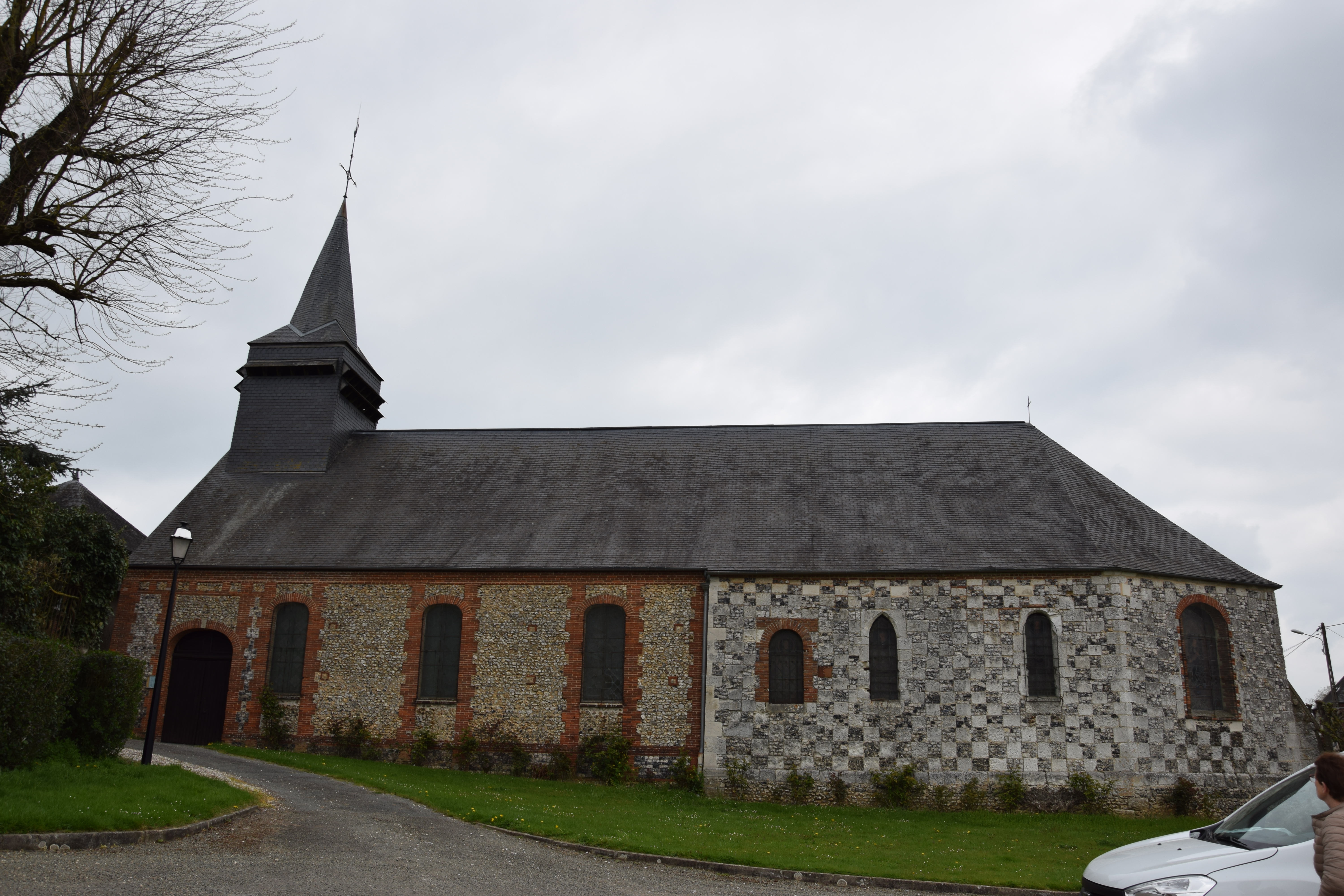 Puiseux-en-Bray